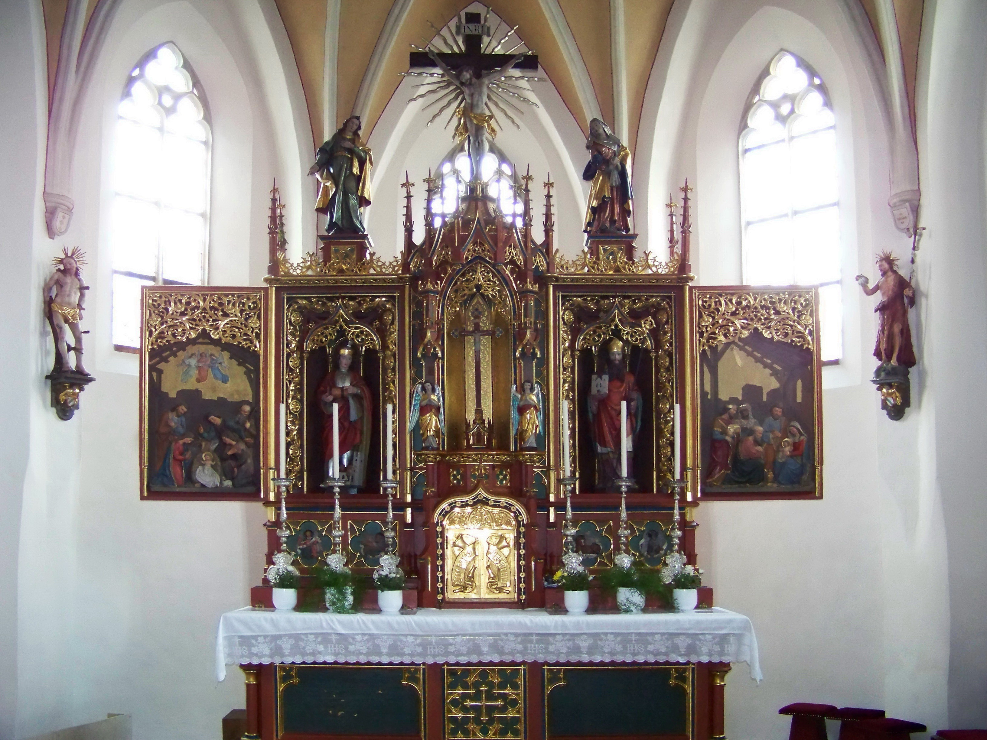 Kirchberg (Kröning) Pfarrer-Spirkner-Straße 5. Katholische Pfarrkirche St. Florian und St. Wolfgang. Saalbau mit eingezogenem Chor und angebauten Seitenschiffen. Anlage aus der zweiten Hälfte des 15. Jahrhunderts. Flügelaltar mit Figuren von St. Florian und St. Wolfgang. Über den Schreinen Kreuzigungsgruppe. In den Flügeln Reliefs der Geburt Jesu und der Darstellung des Herrn mit den Heiligen drei Königen.